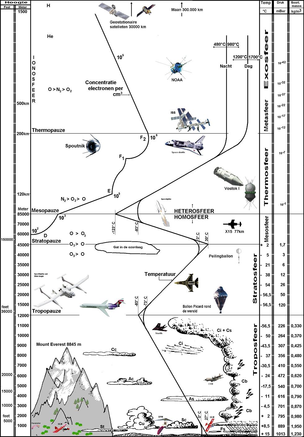 De atmosfeer van eigen fabricaat